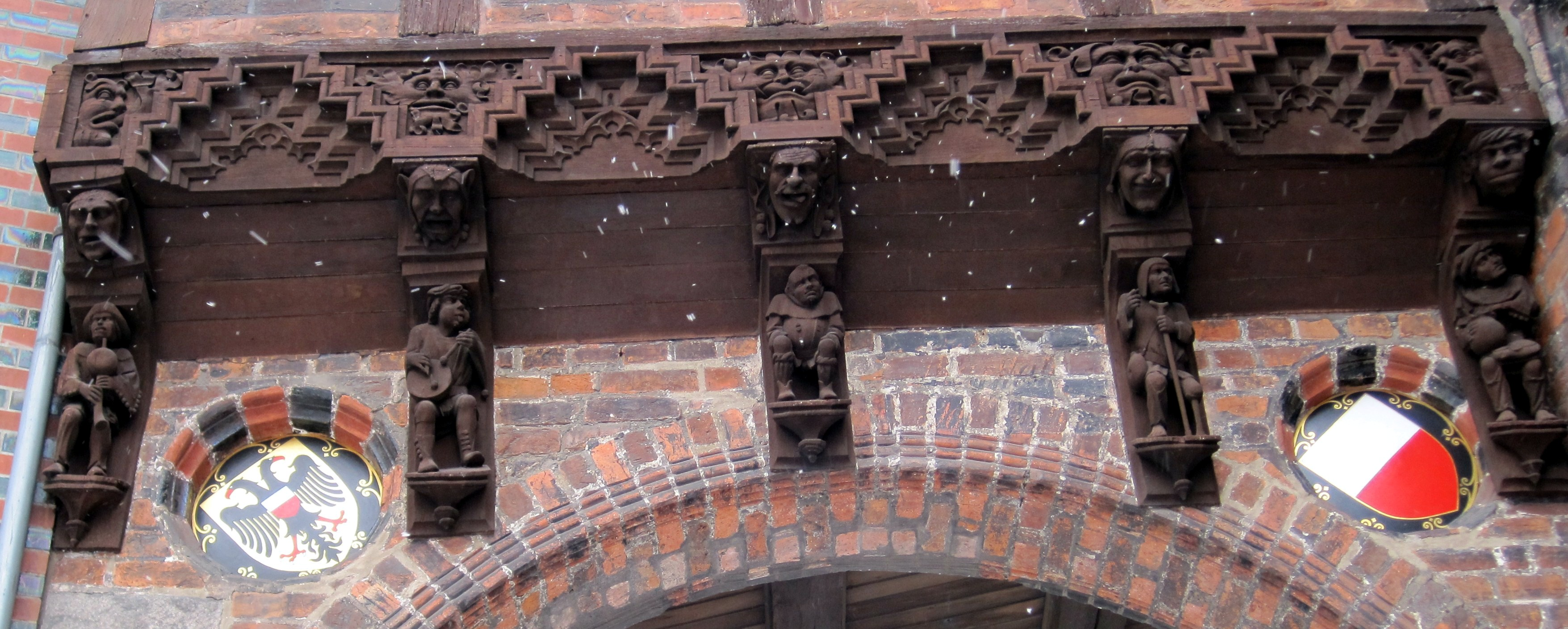 Geschnitzte Balkenköpfe getragen von figürlichen Knaggen (Dudelsachbläser, Beckenschläger, Bürger und Bettler) über der Toreinfahrt zum Lübecker Marstall in der Gr. Burgstraße.